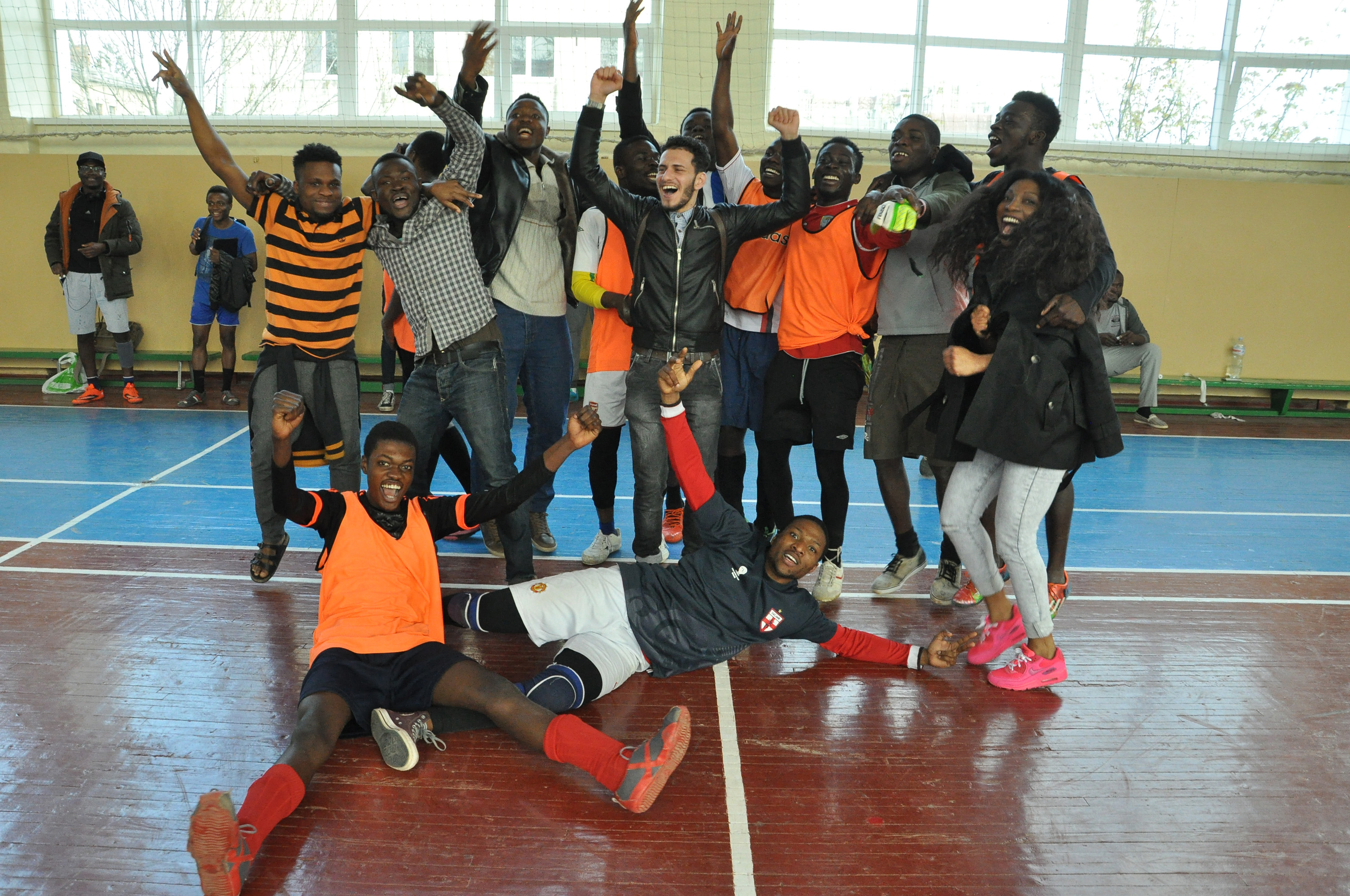 Міні-футбол «Ліга чемпіонів» Тернопільського державного медичного університету імені І. Я. Горбачевського. Півфінальні та фінальний поєдинки 26 квітня 2016 року.